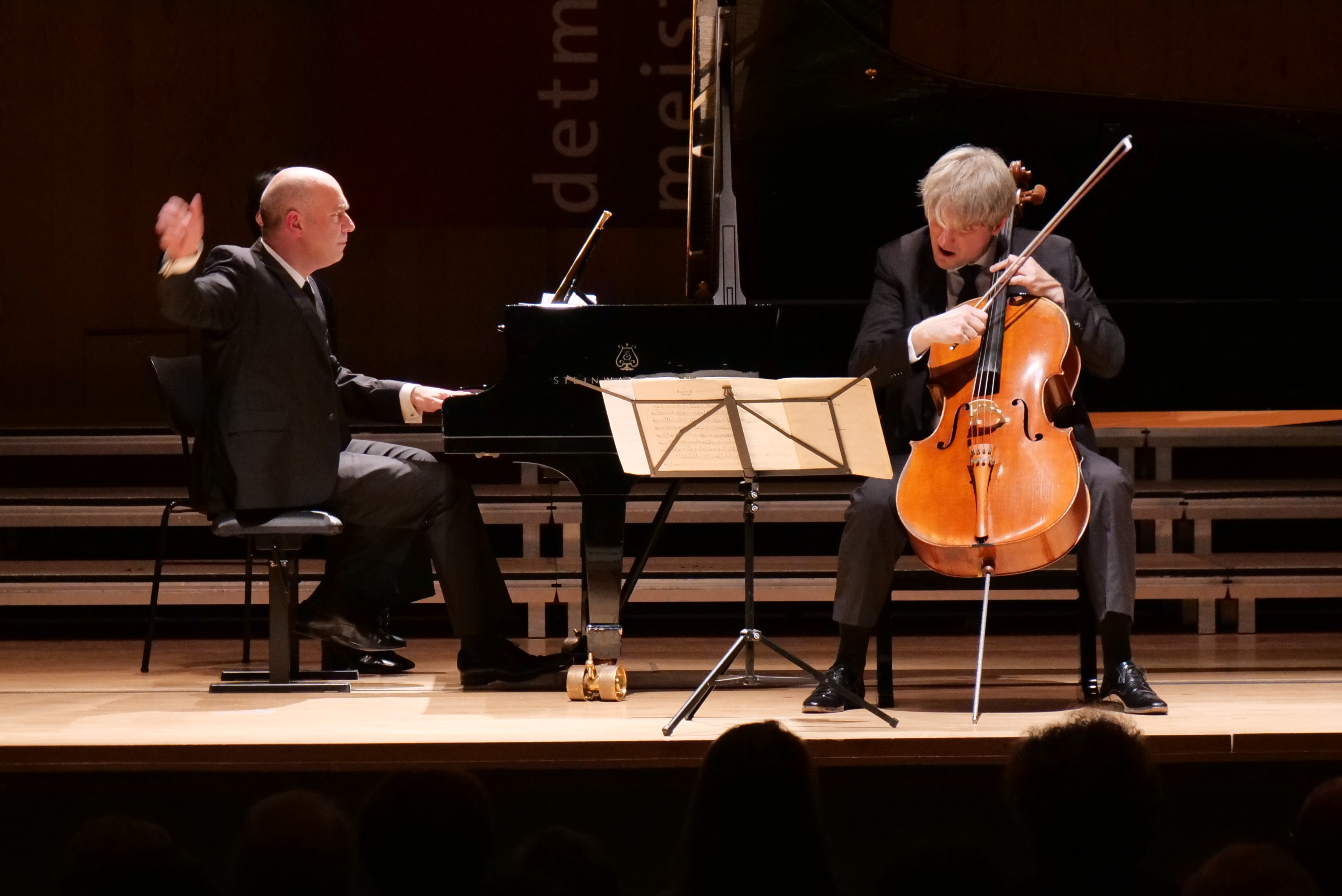 Jérôme Pernoo & Jérôme Ducros beim Meisterkonzert am 23.10.2018 im Konzerthaus der HfM Detmold.